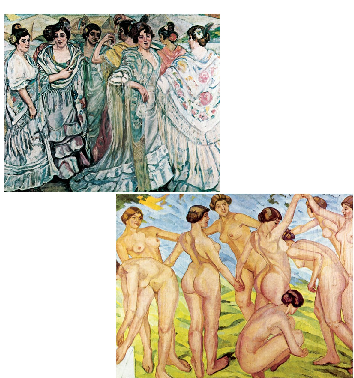 Francisco Iturrinoren bi koadro. Ezkerrean: “Mantones”. Behean: “Desnudos”